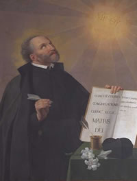 Saint Jean Leonardi.